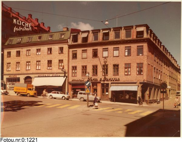 Kungsgatan 20-22 i hörnan av Ekelundsgatan i Göteborg. Foto från år 1961 godkänt för publicering från lågupplöst orginal vid Göteborgs stadsmuseum.